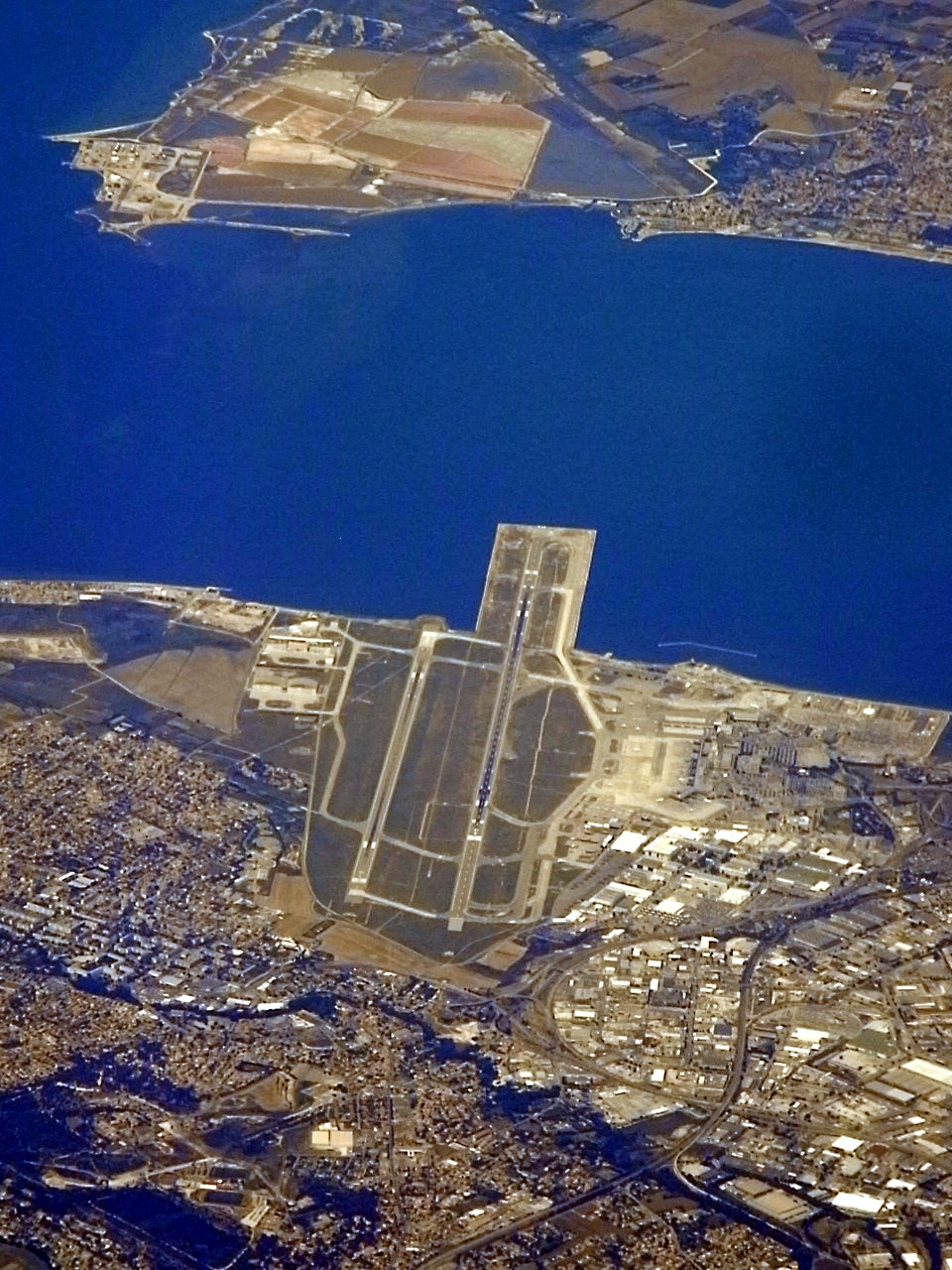 Der Flughafen Marseille Provence am/im Mar de Bèrra (Étang de Berre). Rechts im Hintergrund Bèrra de l'Estanh (Berre-l'Étang).